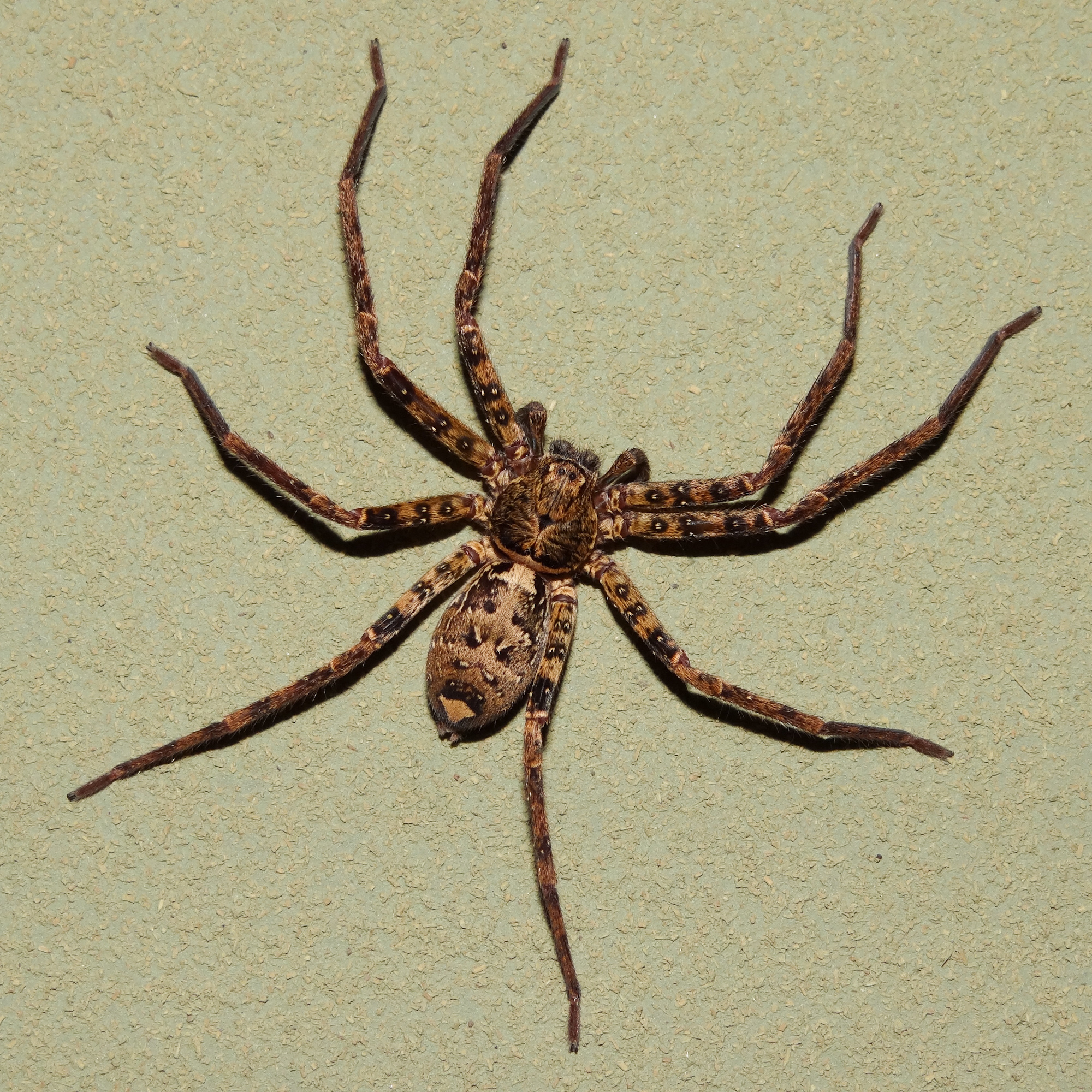 コアシダカグモ Sinopoda forcipata と思われる